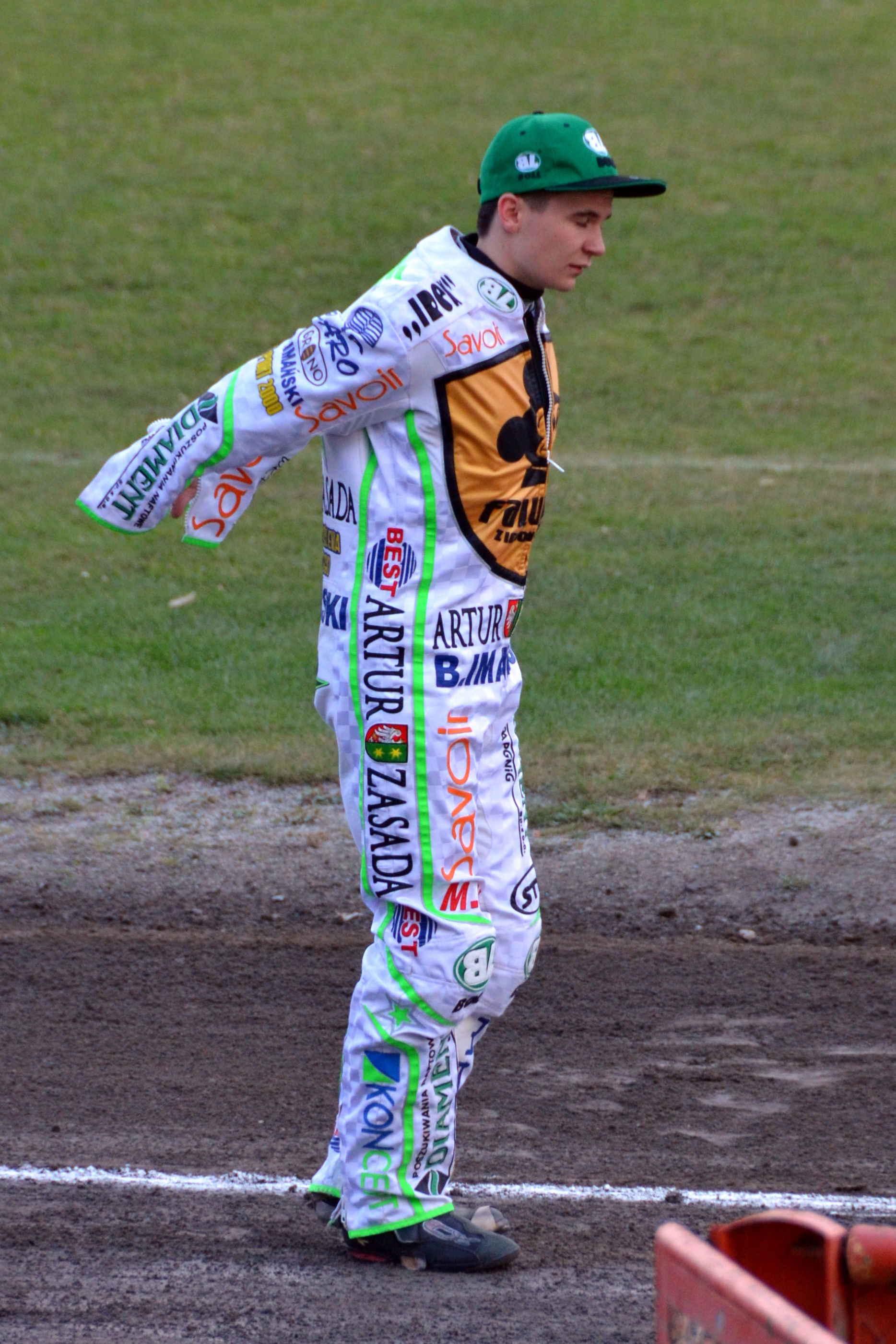 Patryk Dudek na torze w Bydgoszczy